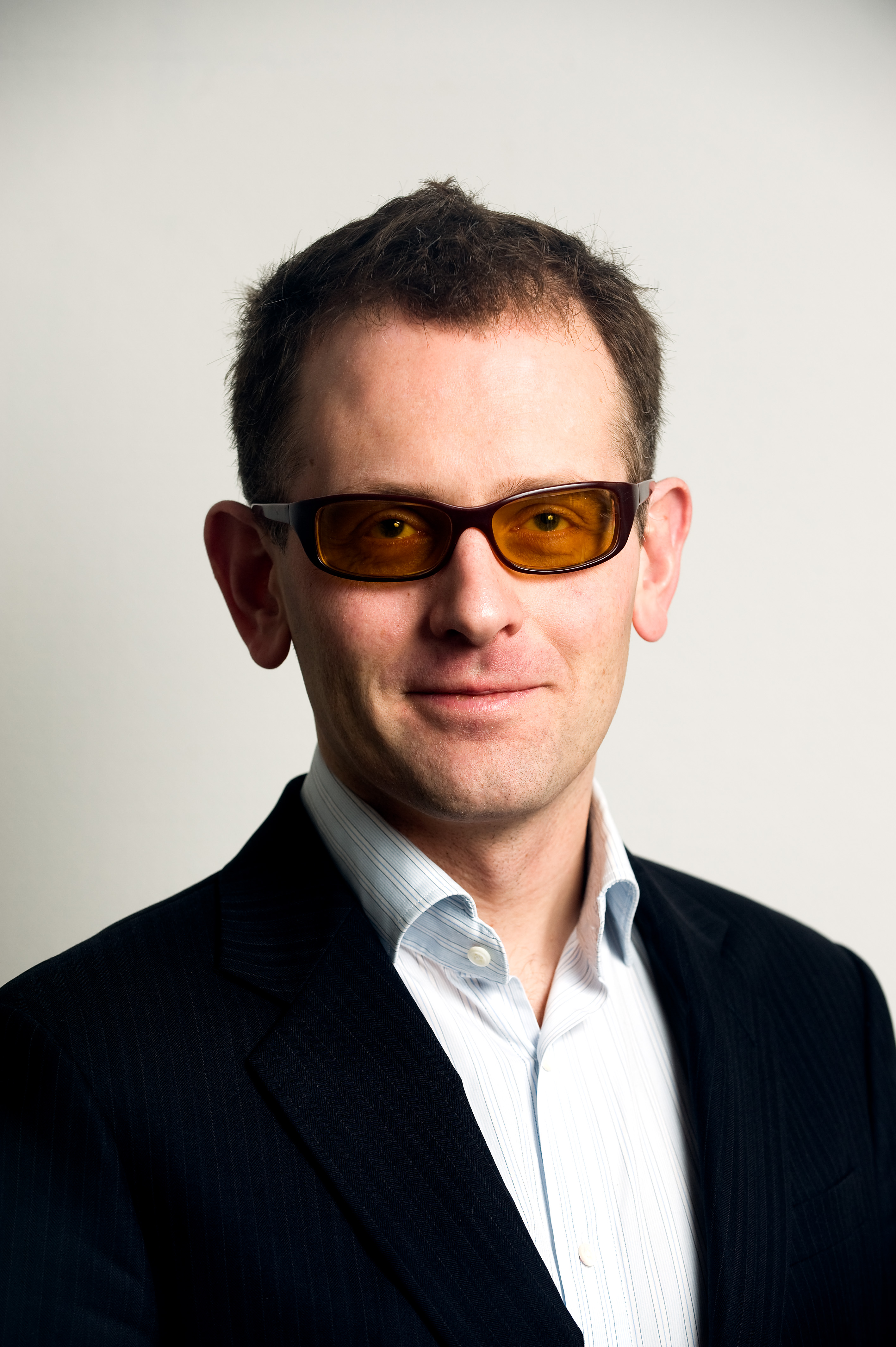 Helgi Hjörvar (A) Island president i Nordiska rådet.